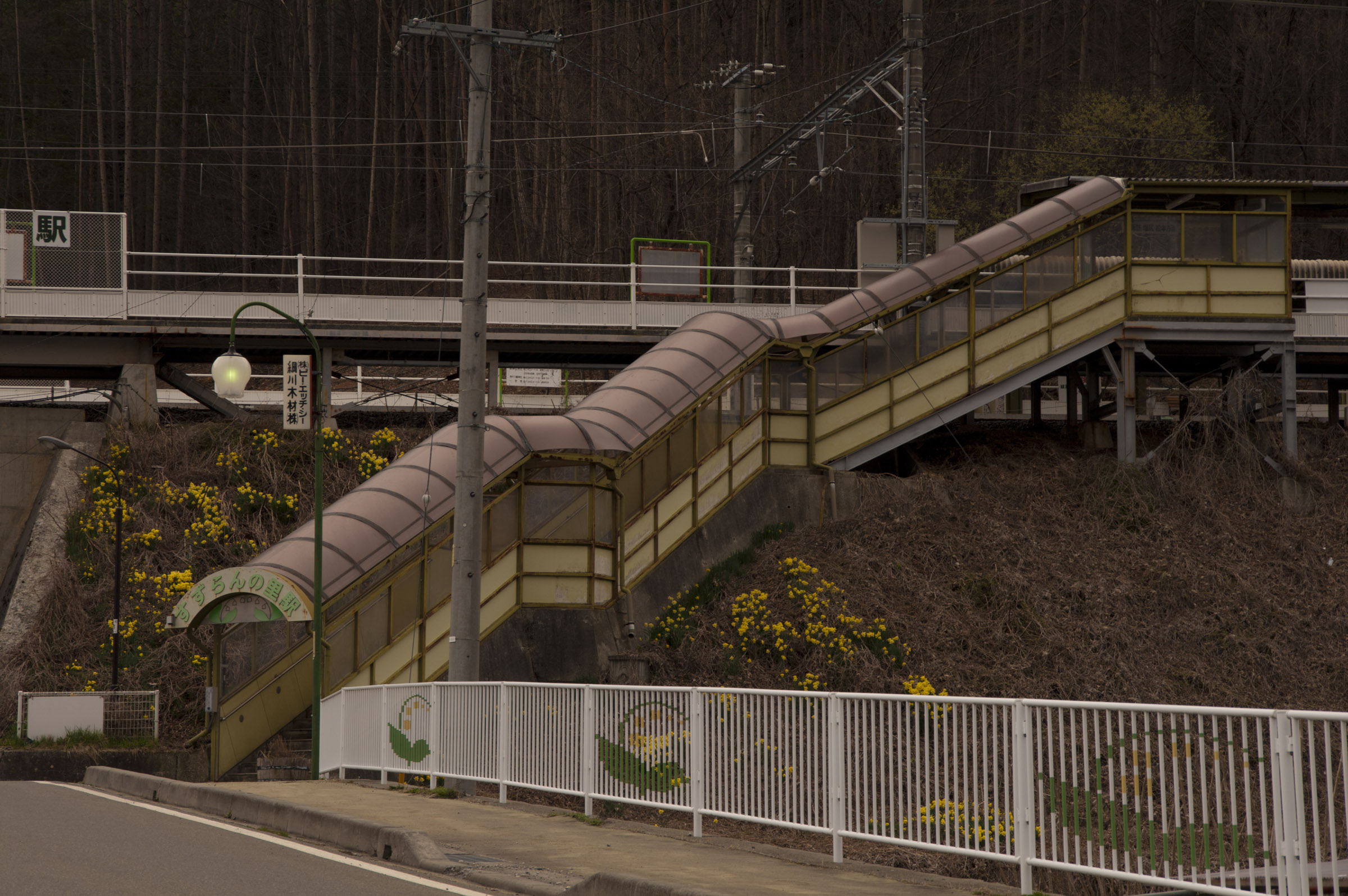 東日本旅客鉄道中央本線すずらんの里駅下り線